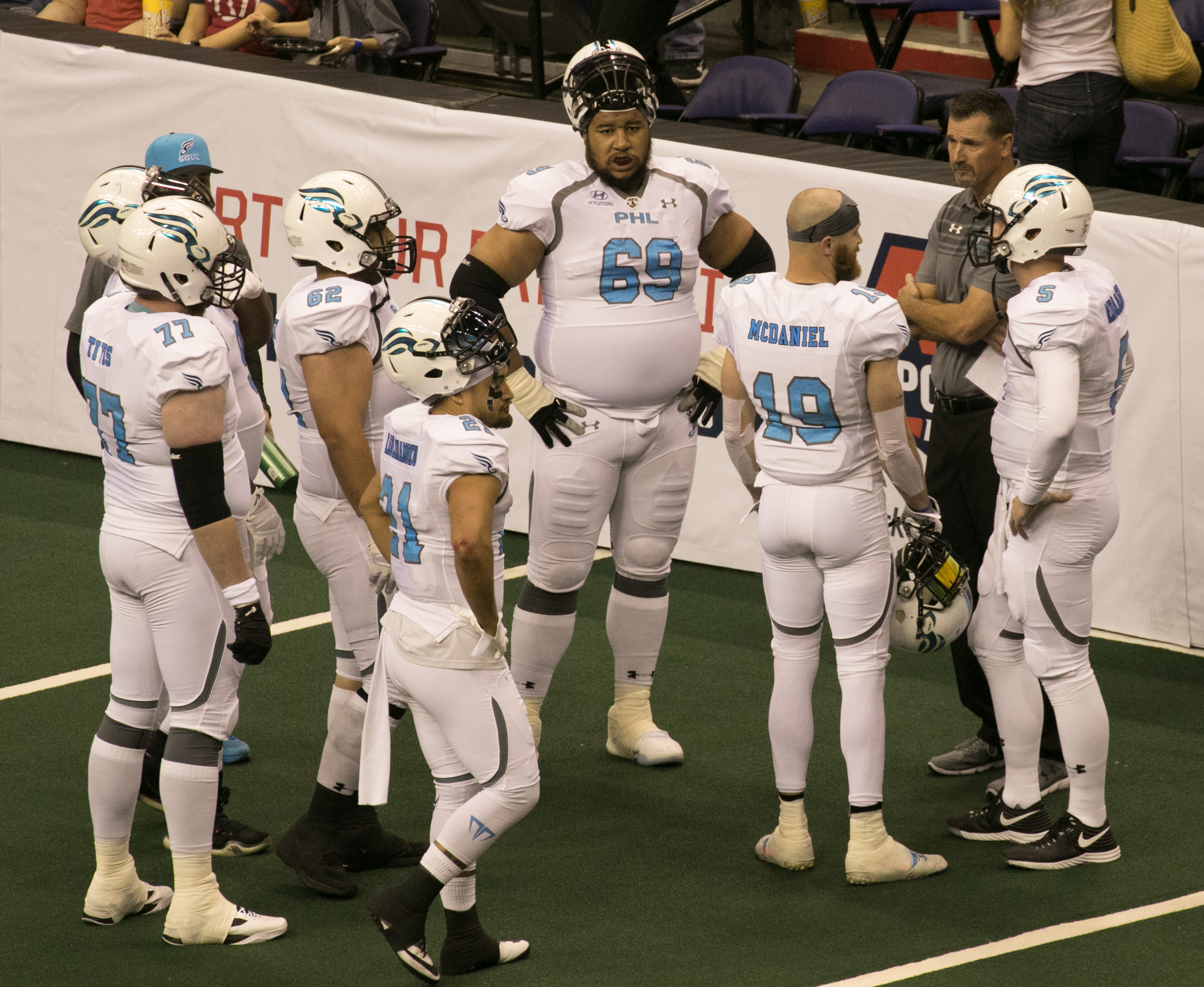 Valor 47 / Philadelphia Soul 48